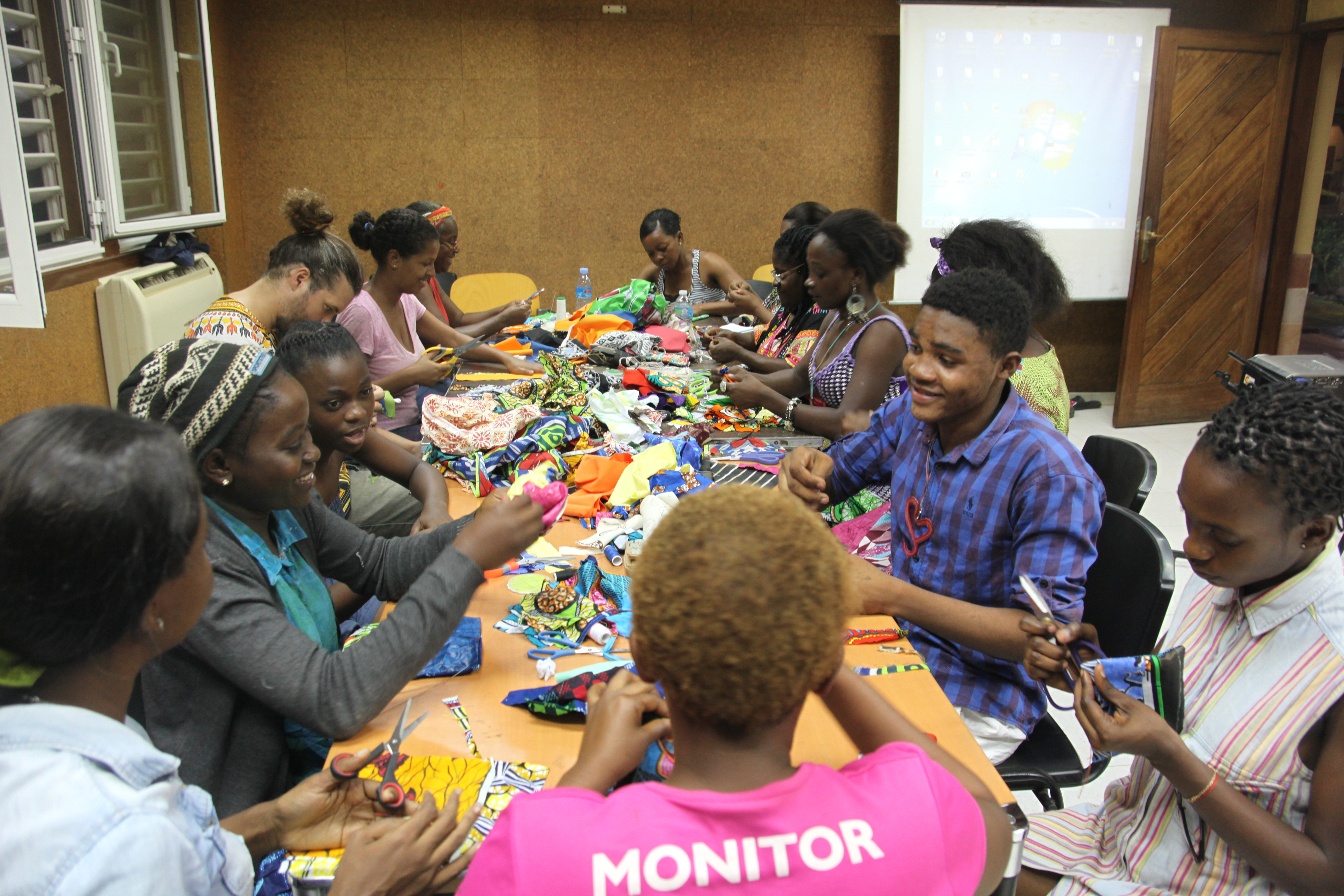 Taller de editoriales cartoneras en el Centro Cultural de España en Malabo. Colectivo de mujeres artesanas. This is an image of "African people at work" from Equatorial Guinea